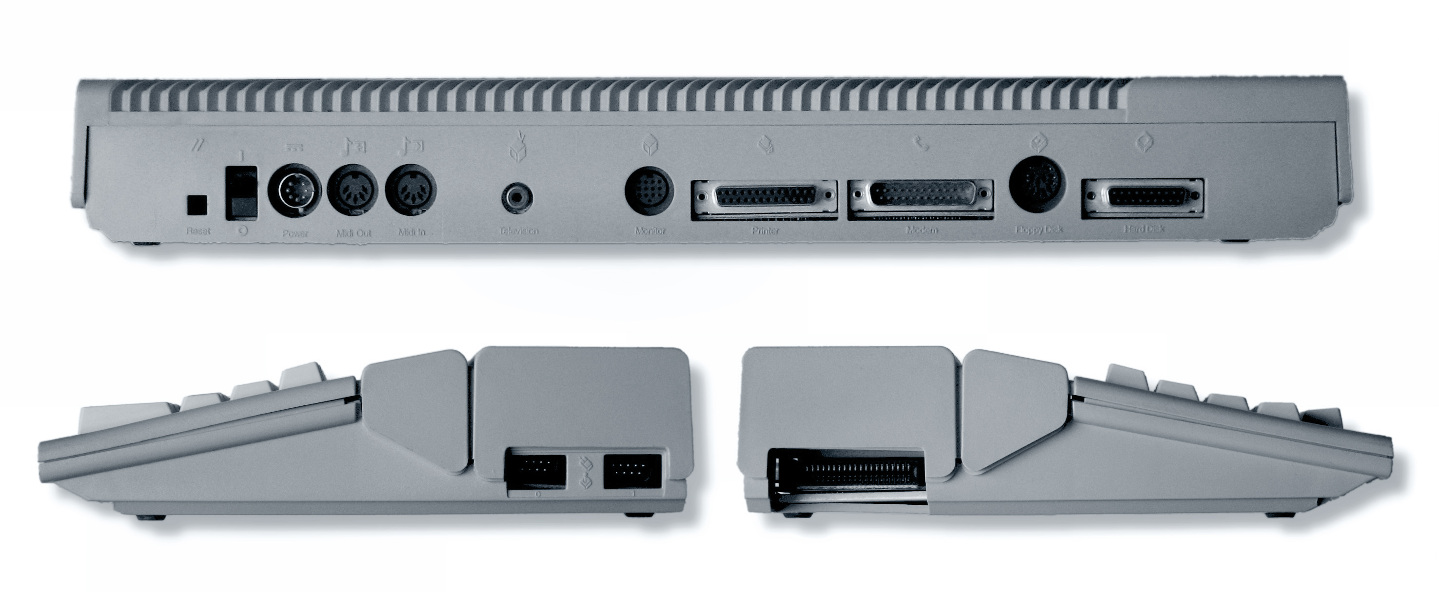 Schnittstellen des Atari 520STM